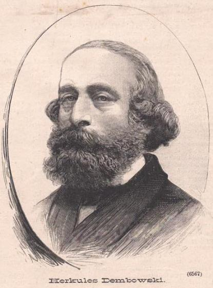 Herkules Dembowski